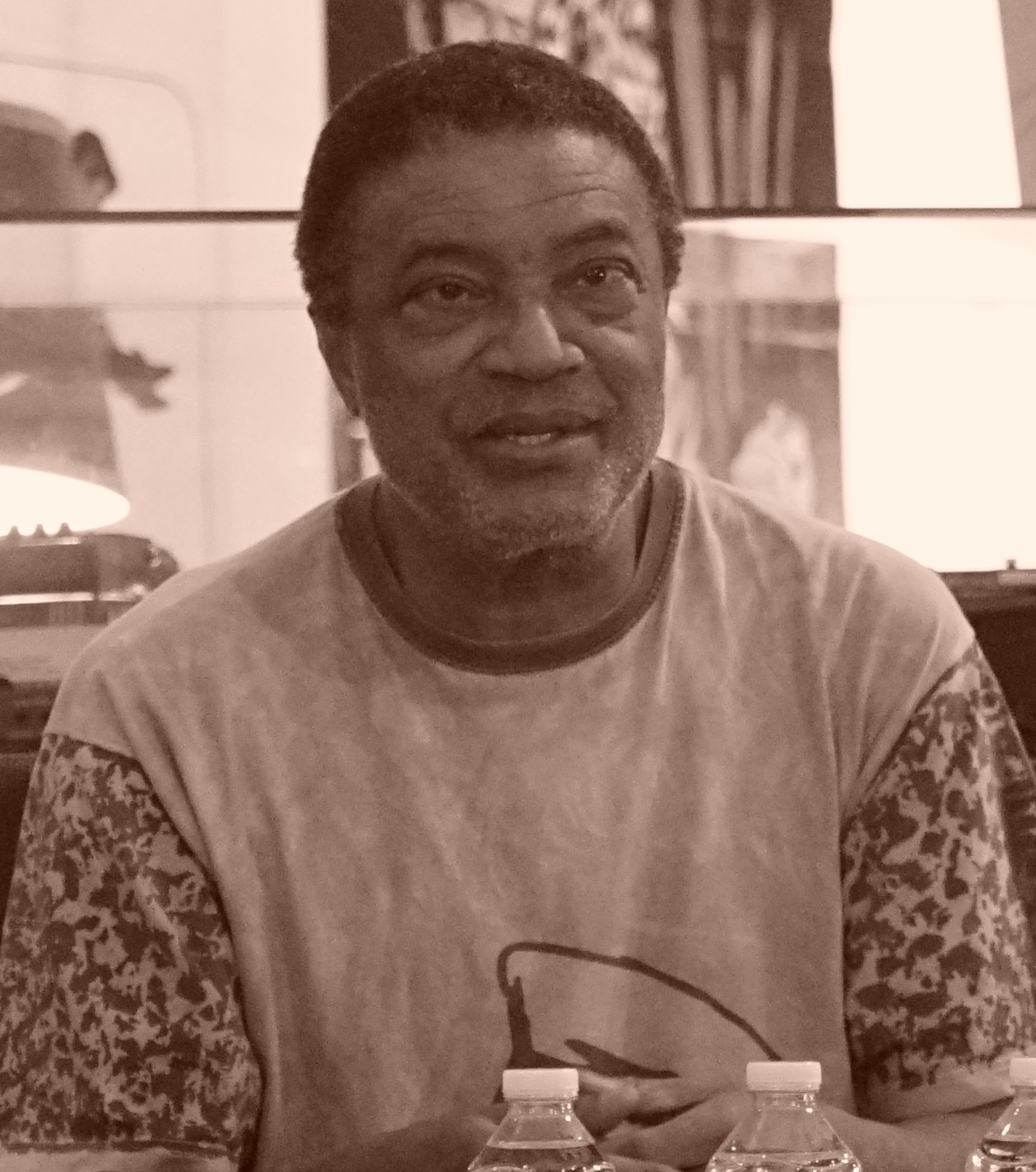 Conférence à Reims, médiathèque Croix-Rouge.